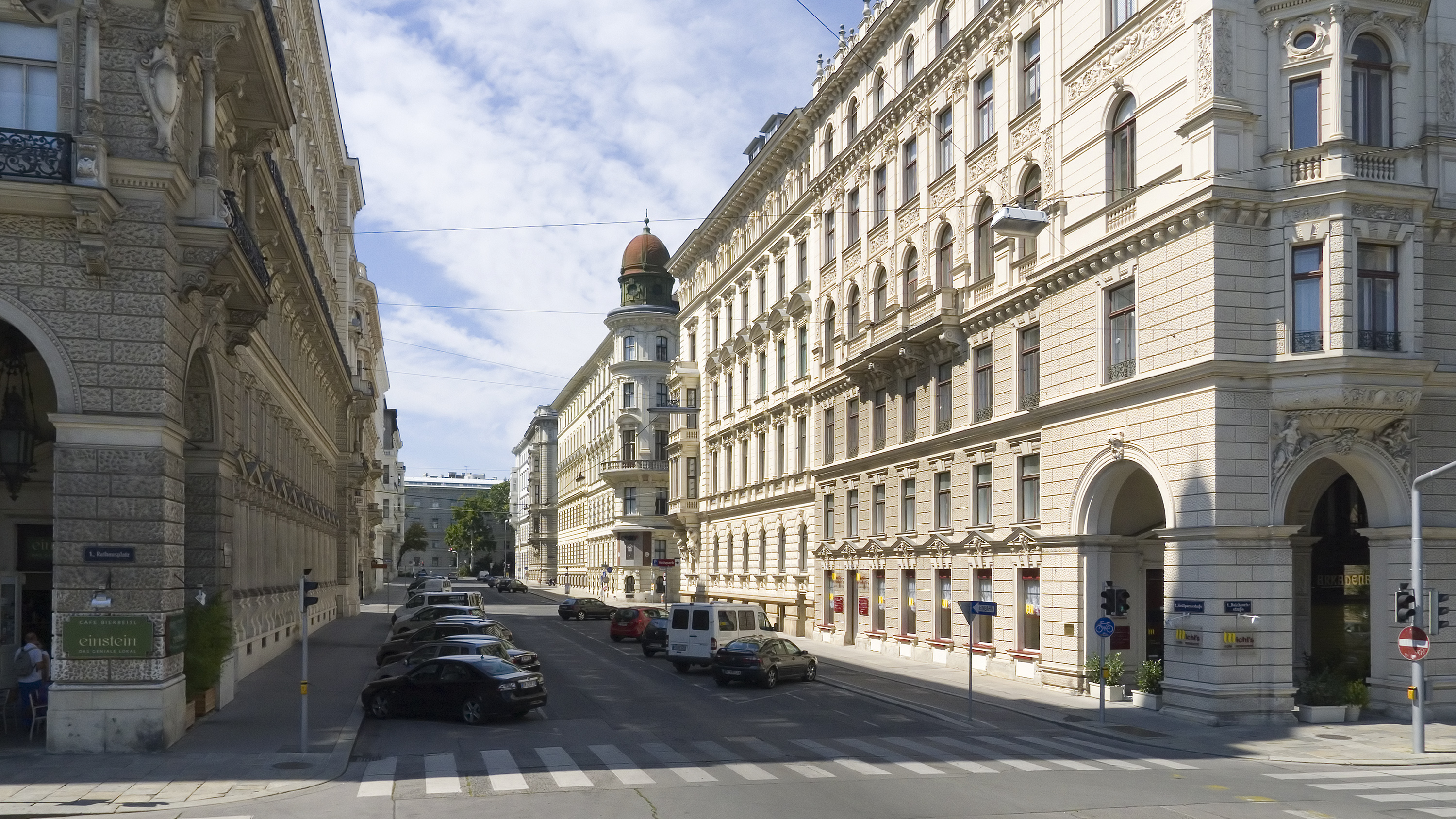 Grillparzerstraße in Wien 1 beim Rathausplatz Richtung Westen